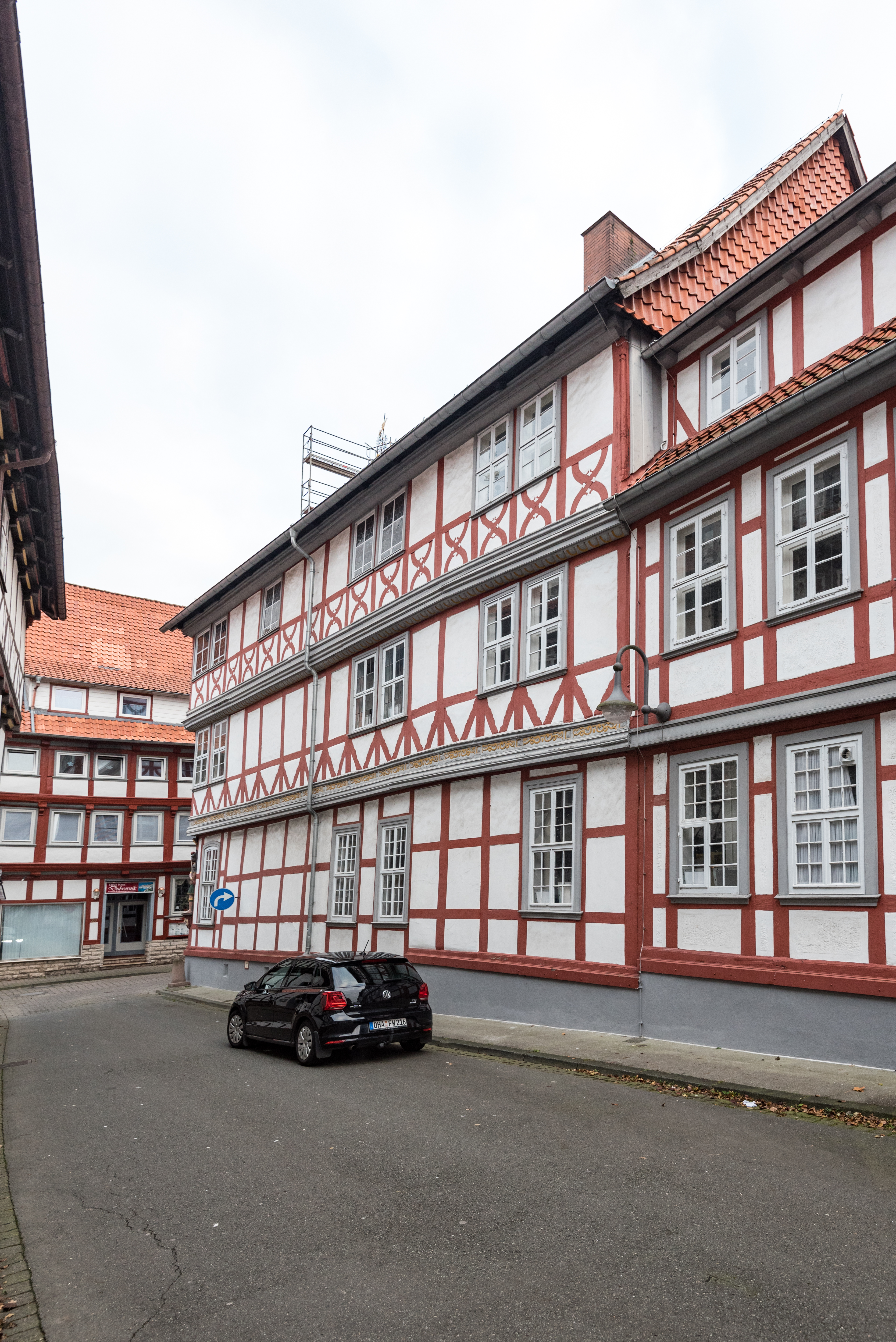 Osterode am Harz, Rollberg 32